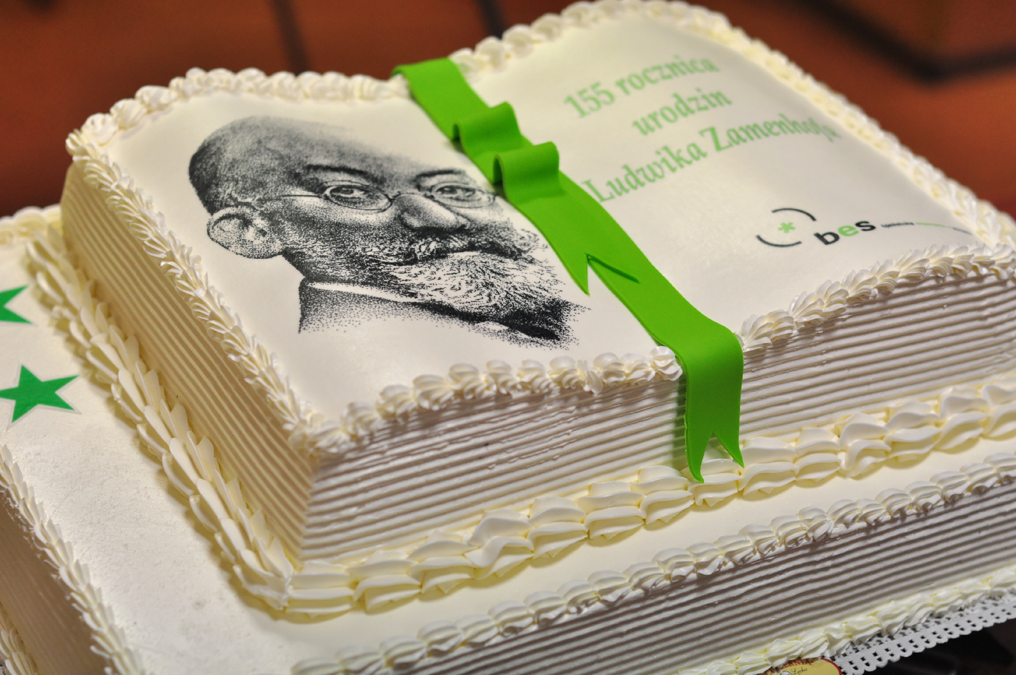 Naskiĝtaga kuko de Zamenhof okaze de Bjalistokaj Zamenhof-Tagoj en 2014.